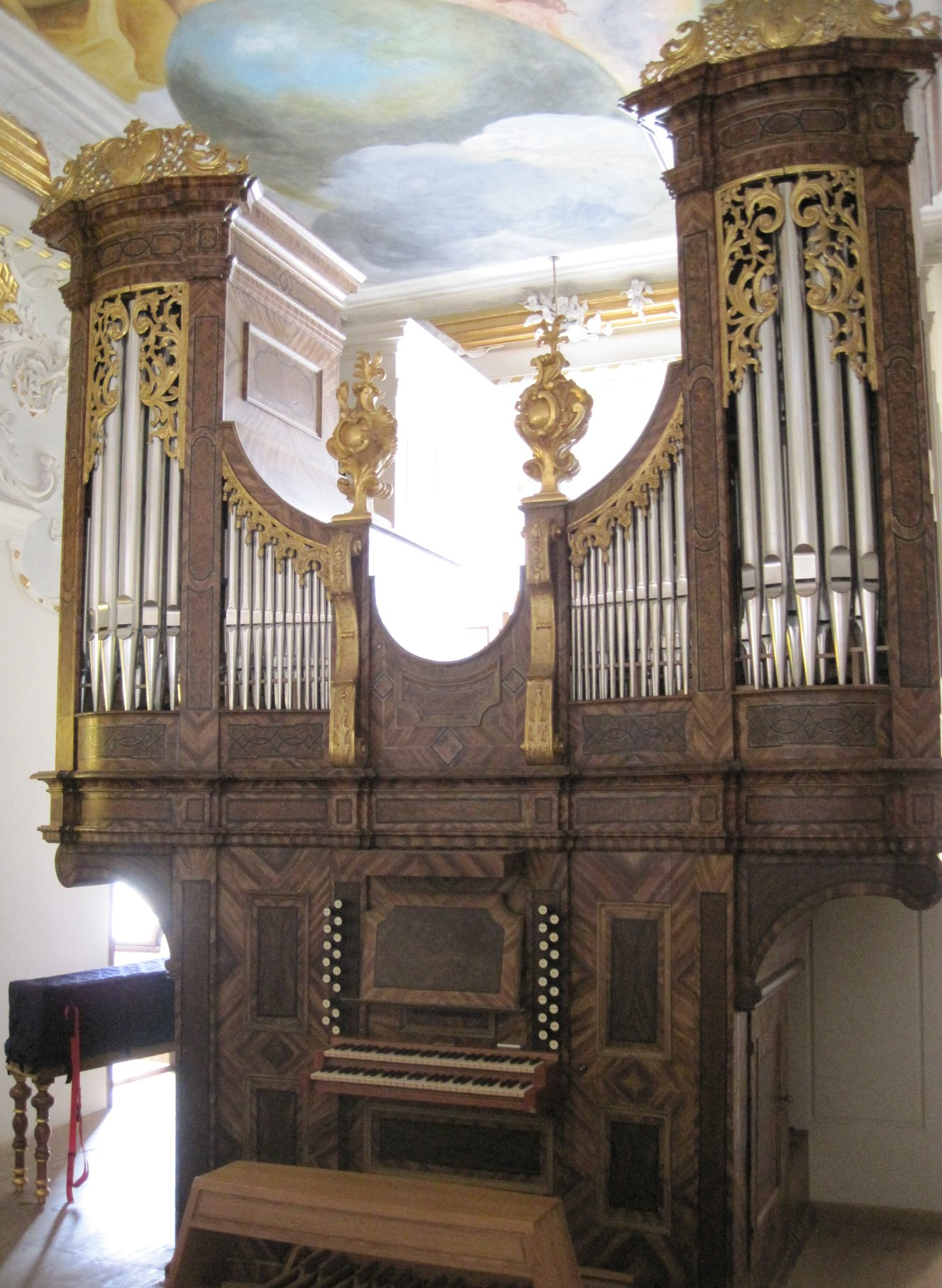 Orgel der Asamkirche Ingolstadt